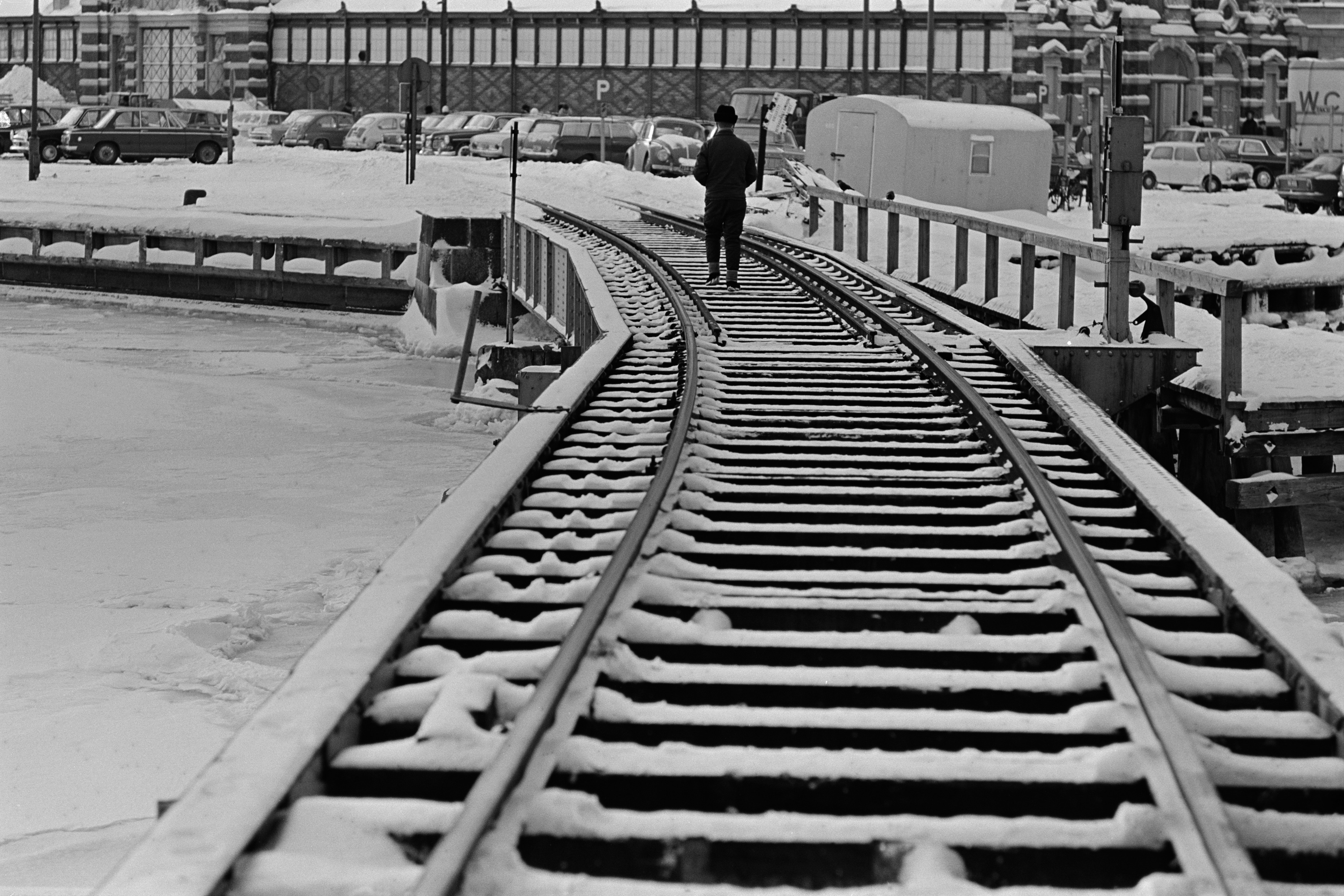 Helsingin satamarata Kauppatorilla.